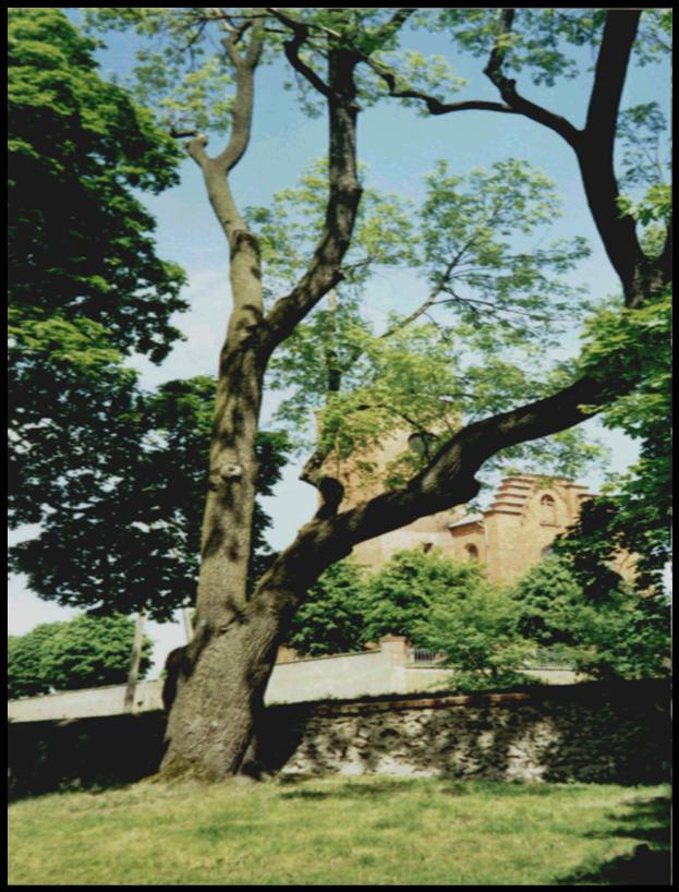 Dąb szypułkowy, jeden z pomników przyrody w Ożarowie